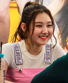 03월 25일 프리스틴 팬사인회